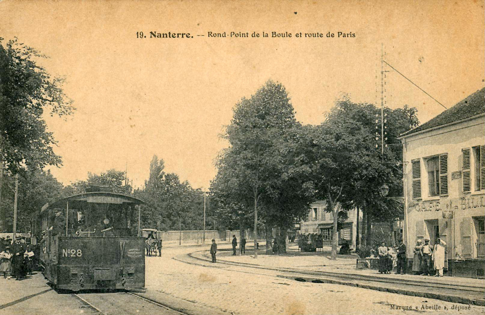 Carte postale ancienne éditée par Abeille, n°19 :NANTERRE - Rond-Point de la Boule et Route de Paris